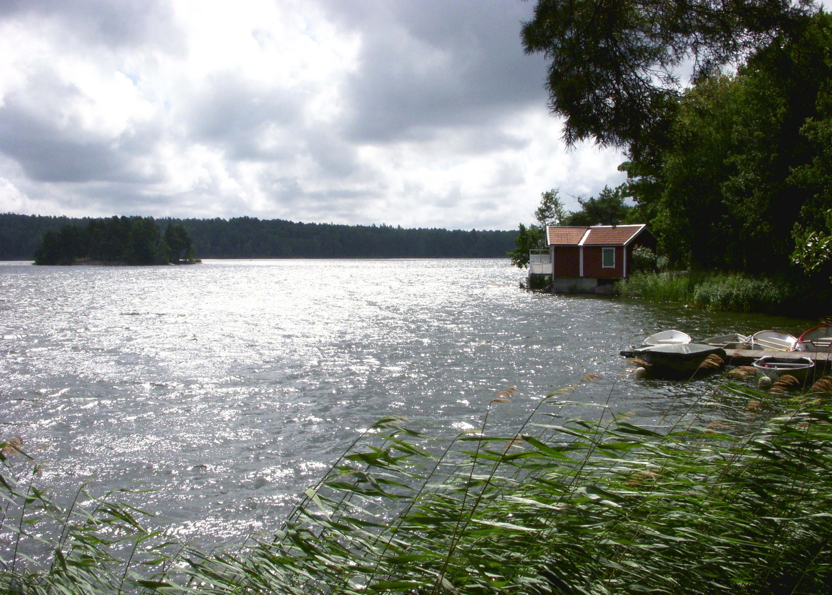 Sjön Magelungen, Stockholm